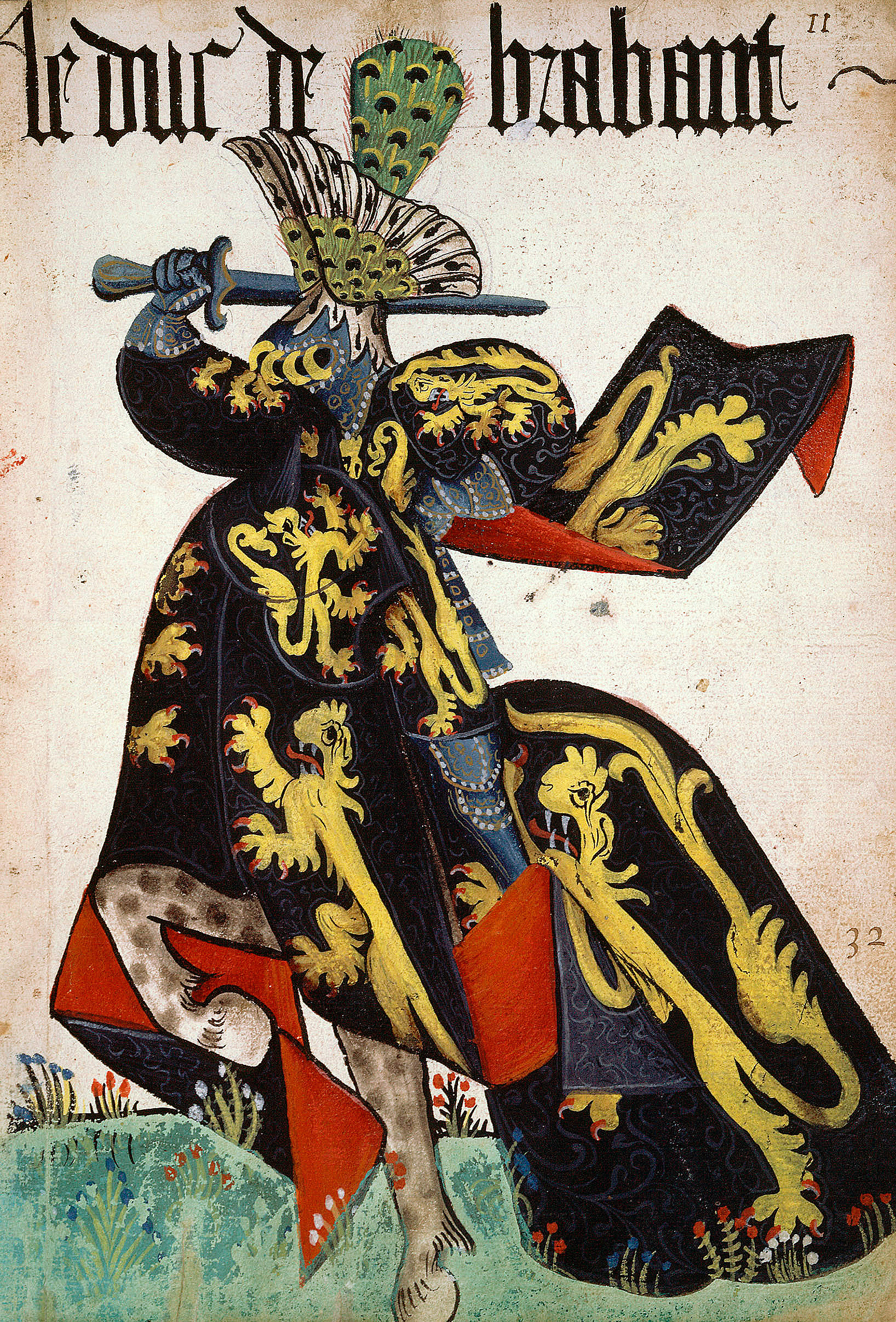 Armorial équestre de la Toison d'or, Flandre, ca. 1433-1435 - Le duc de Brabant, folio 11 du manuscrit BNF Arsenal 4790